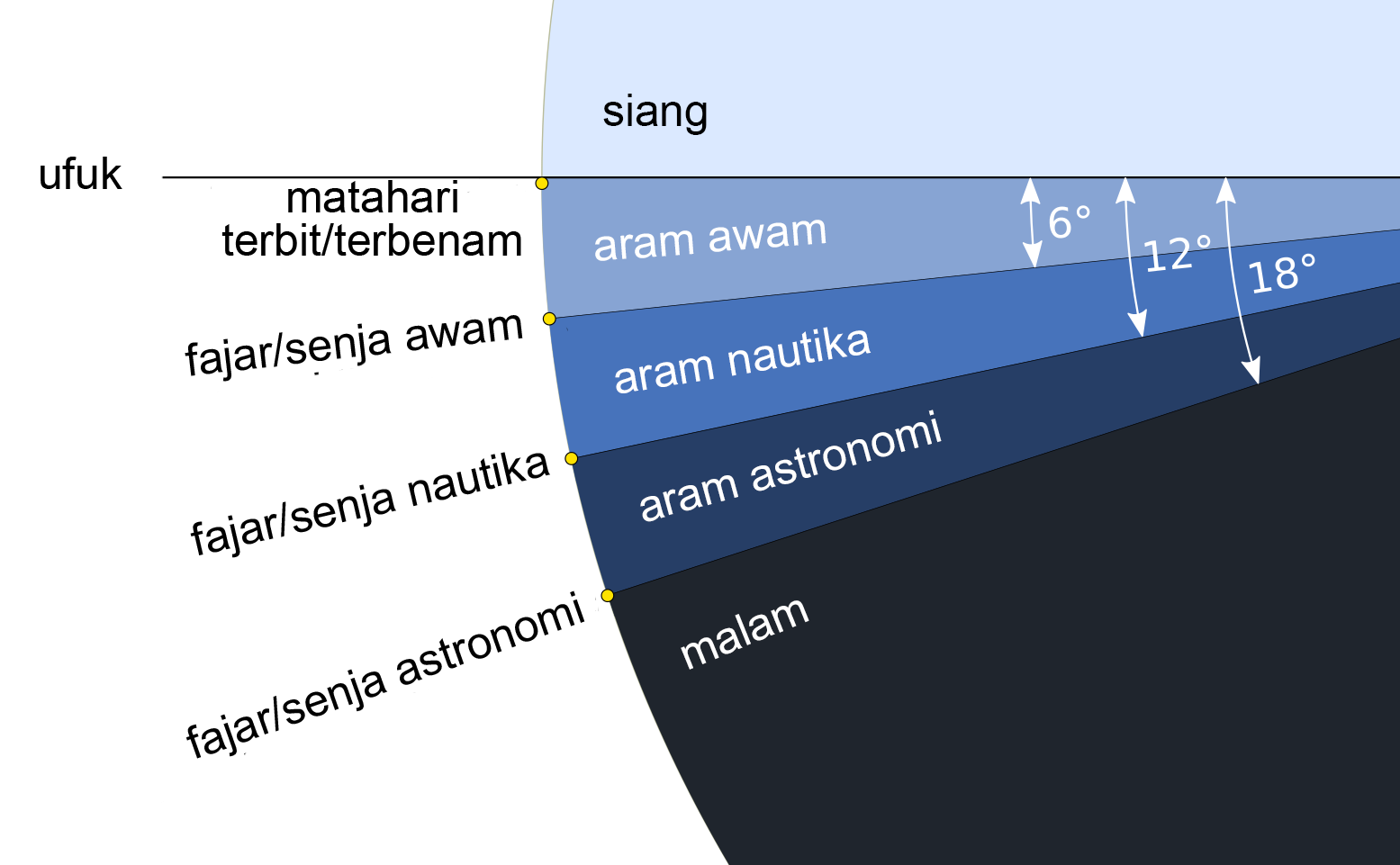 Tiga jenis senja dan ukuran mereka. Matahari dilukis mengikut skala (dengan diameter 32 arka minit [0.53 °])